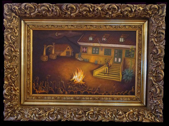 Dit is het schilderij (Victorie bij Porto Mari) met een illustratie van hoe Tula zijn mede lotgenoten toesprak nadat zij op die beruchte avond het leger van luitenant Plegher hadden verslagen bij landhuis Porto Mari. Dit was het enige victorie moment dat onze voorouders hebben mogen ervaren in hun leven als slaaf op Curaçao.